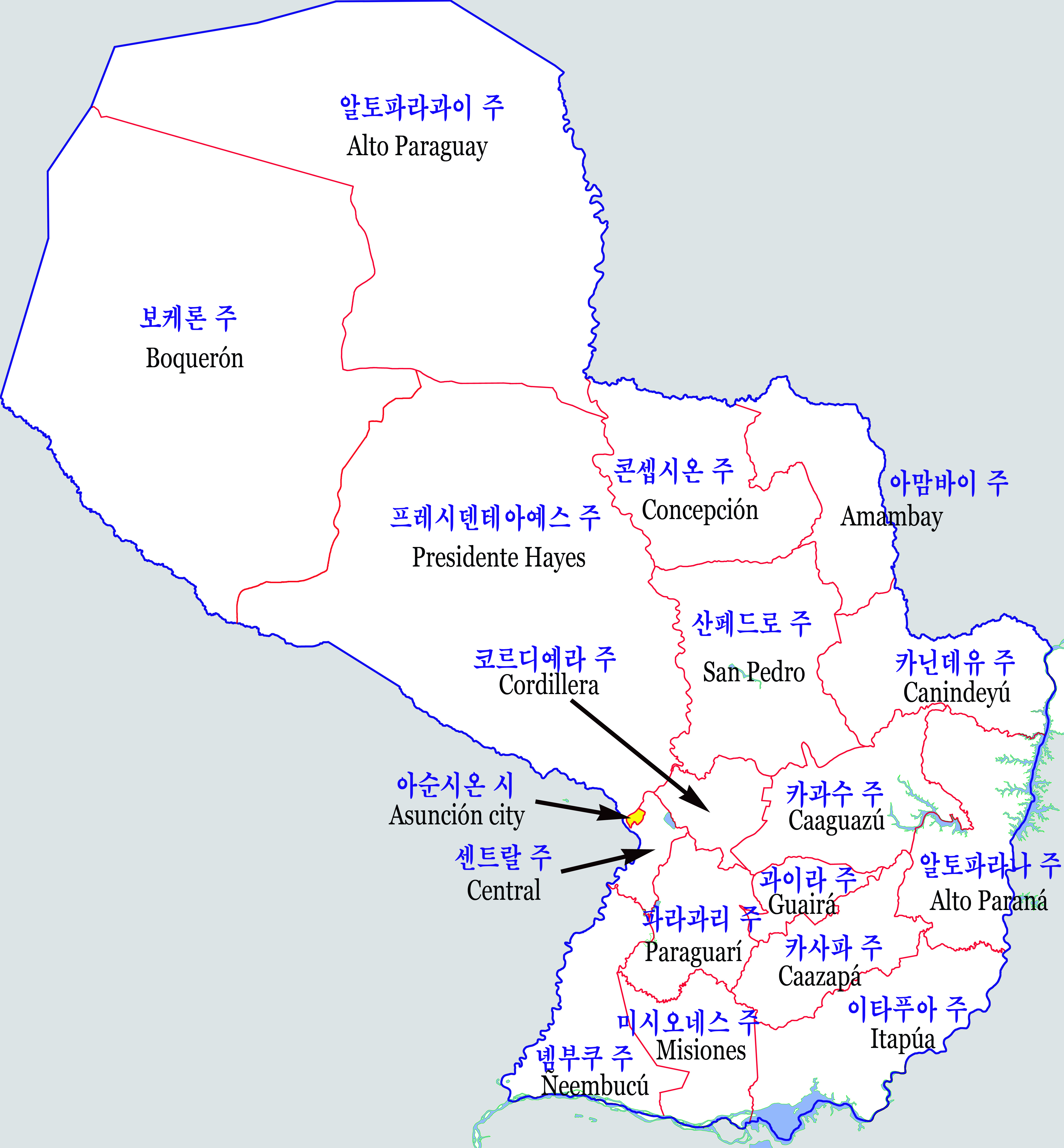 파라과이 행정구역